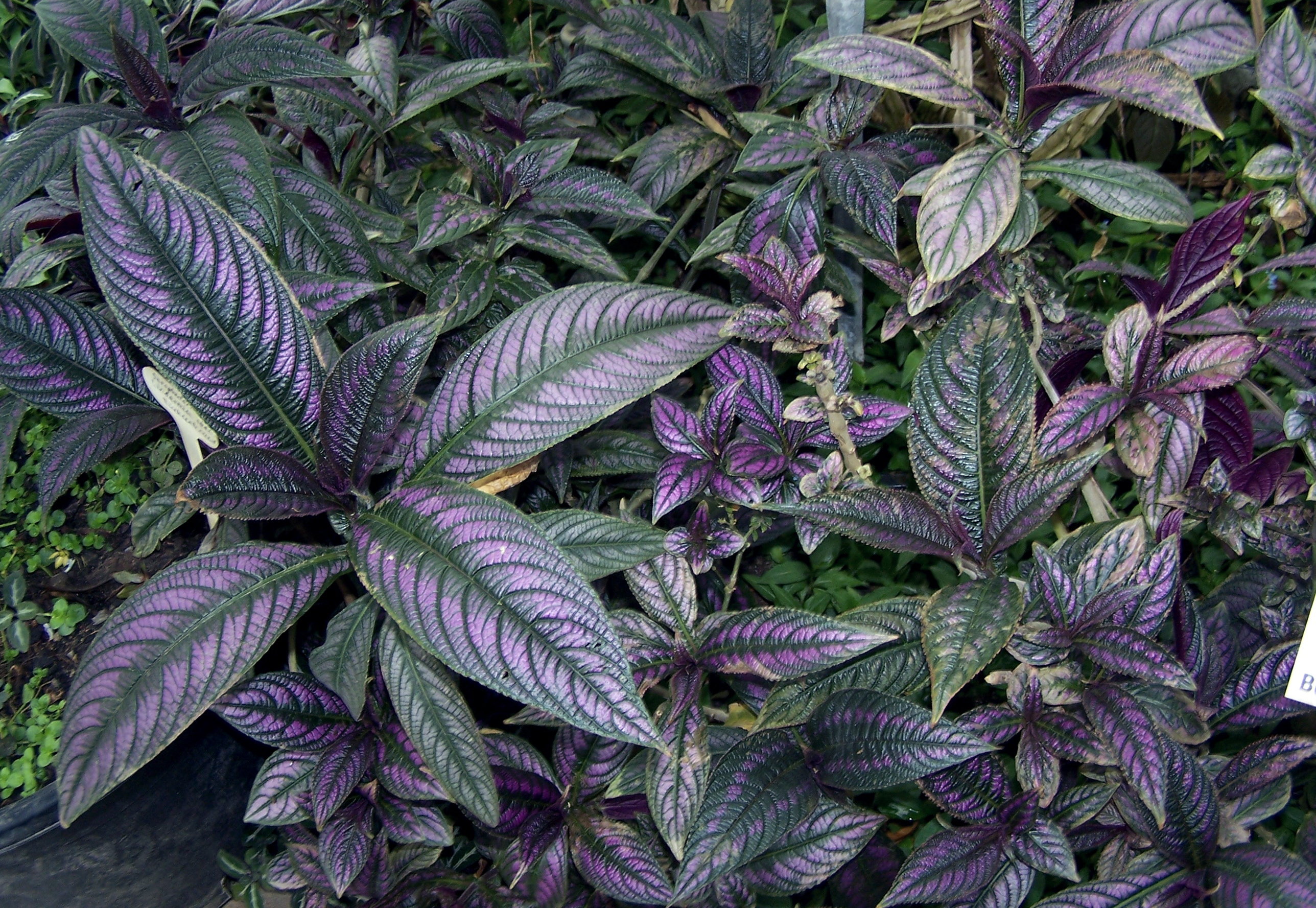 Perilepta dyeriana 17 juin 2006 Vieux jardin botanique de Göttingen